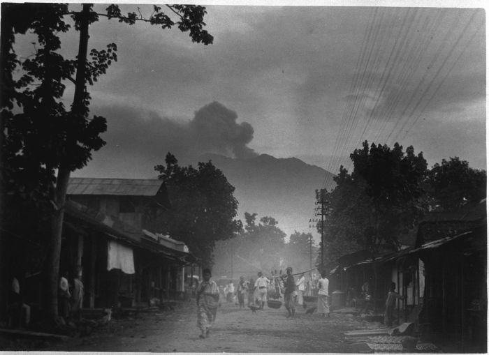 Foto. Oost-Java, de werkende vulkaan Raoeng in het Idjengebergte vanuit Glen More gezien